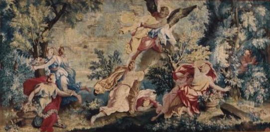 Manufactura Real de Beauvais, Francia, circa.1730. Cartón de René Antoine Houasse (1645-1710). Tapiz de lana y seda. Llargo: 4,96 m y alto: 2,75 m. Donación de Carmen Díaz Vélez de Álvarez de Toledo y de Matilde Díaz Vélez al Museo Nacional de Arte Decorativo. Buenos Aires. Argentina.